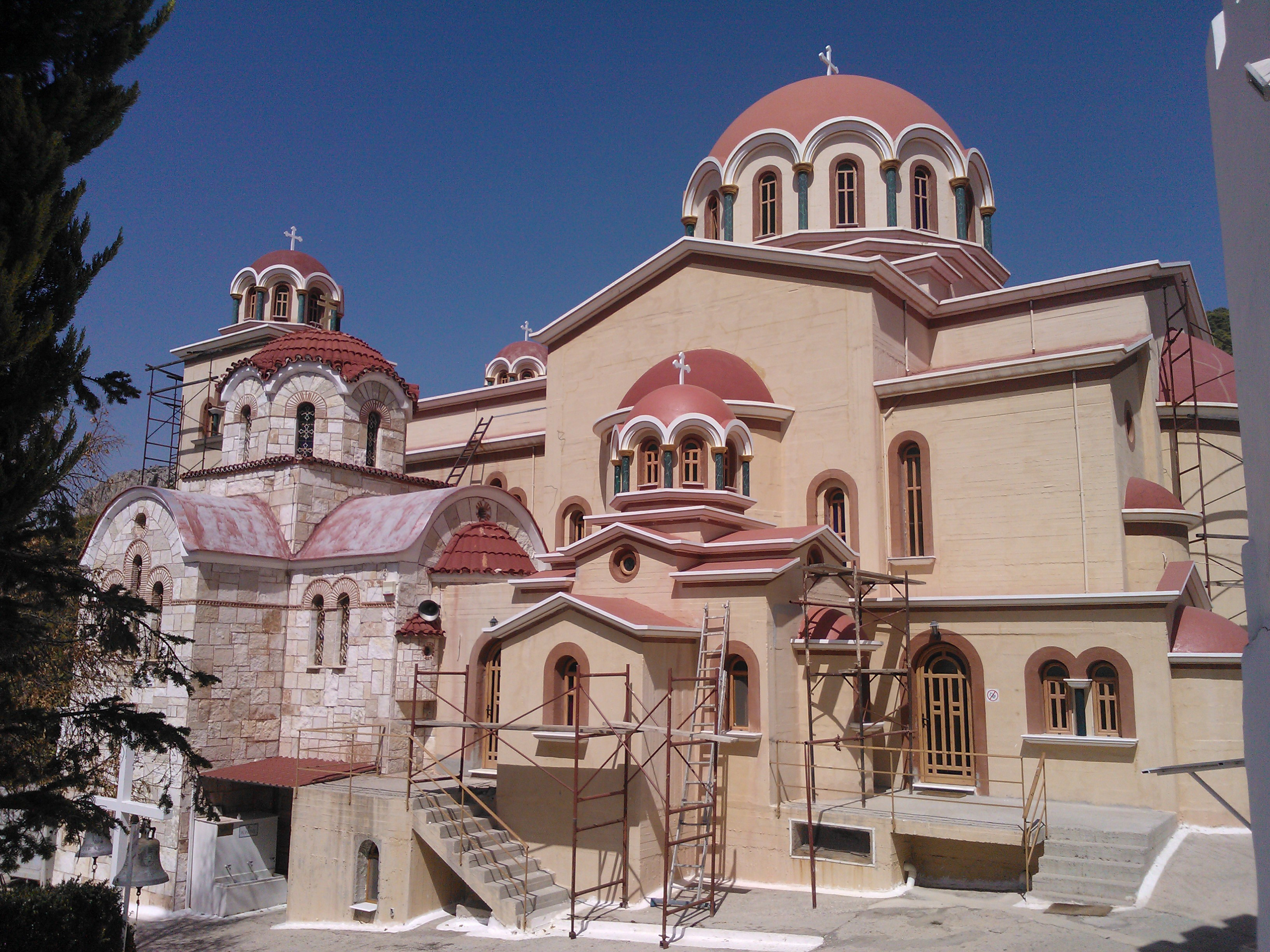 Собор свв. Киприана и Иустины в Фили, Аттика, Греция